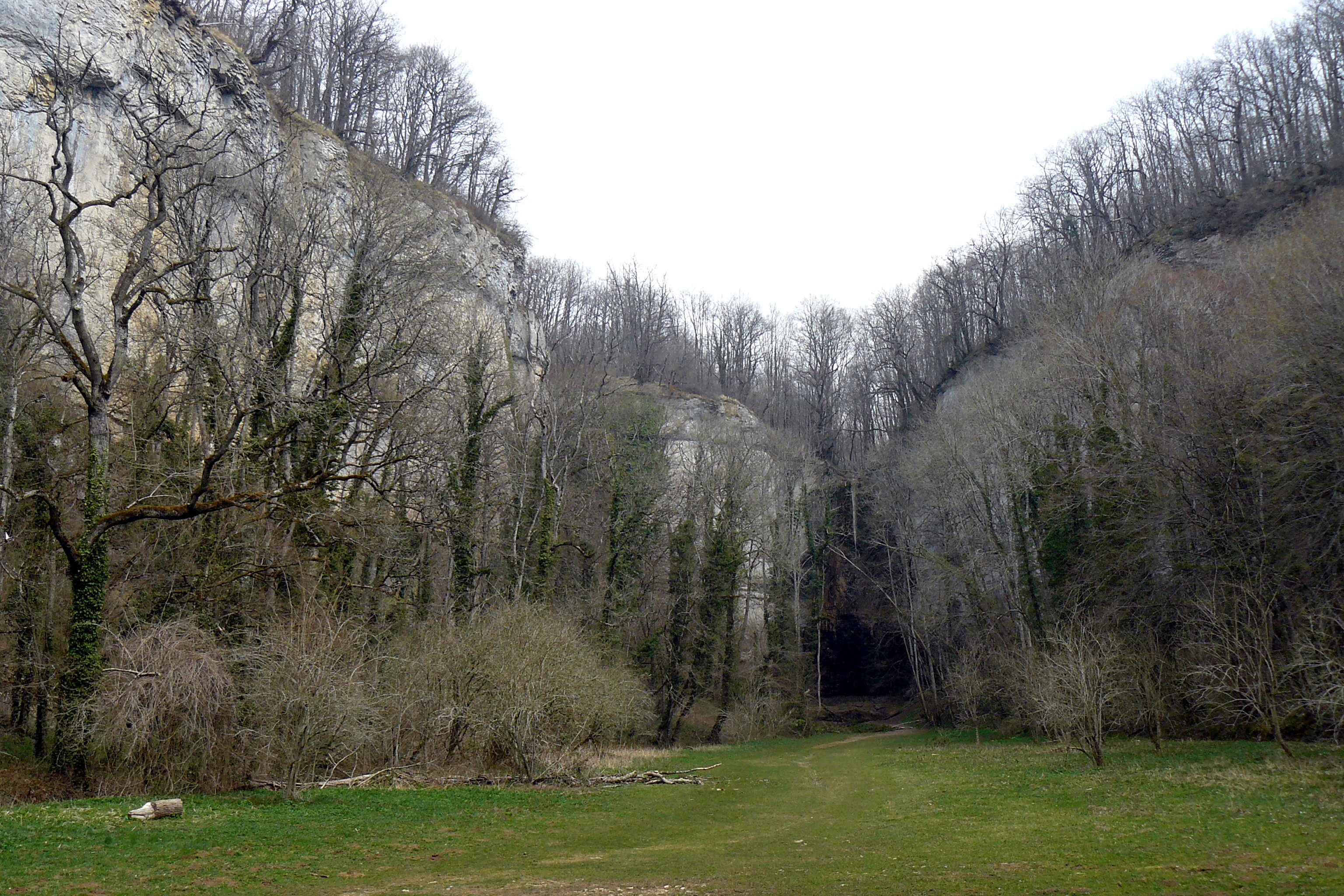 Cirque du Bout du Monde, à Vauchignon (Côte d'Or)